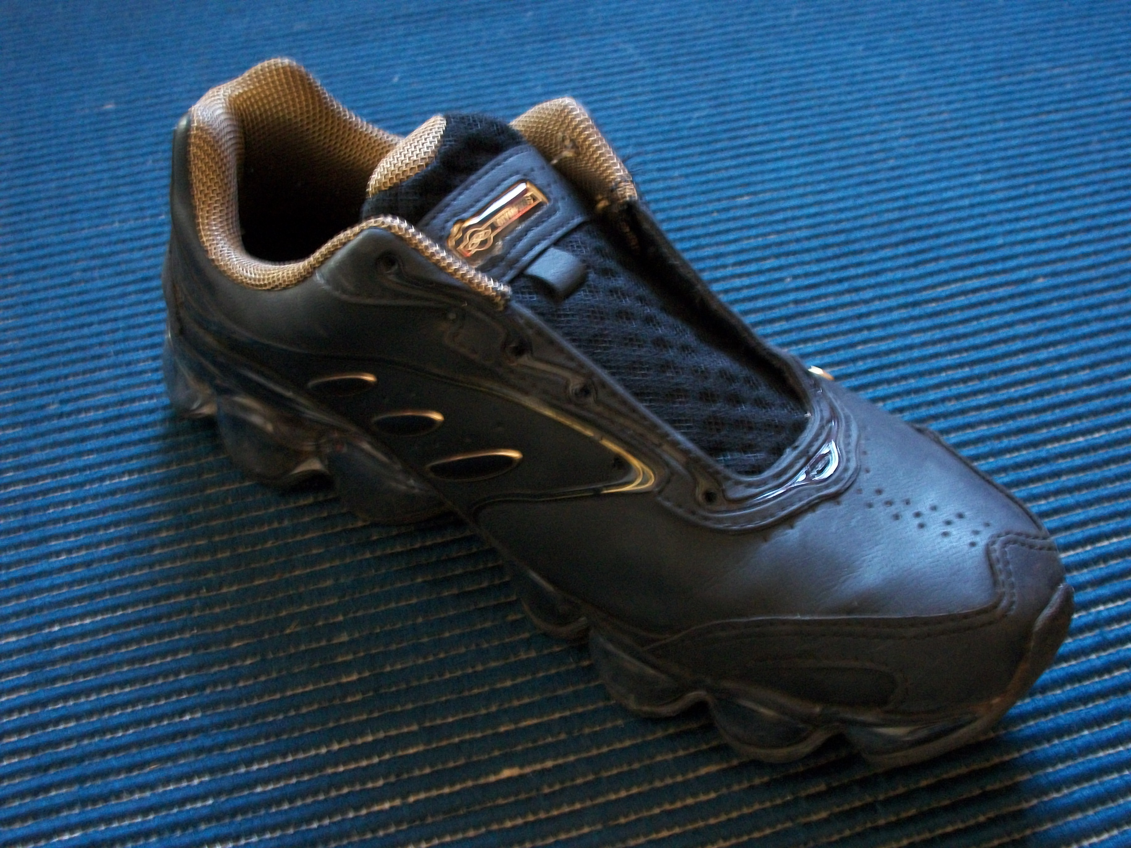 Olympikus Zomax Zyon